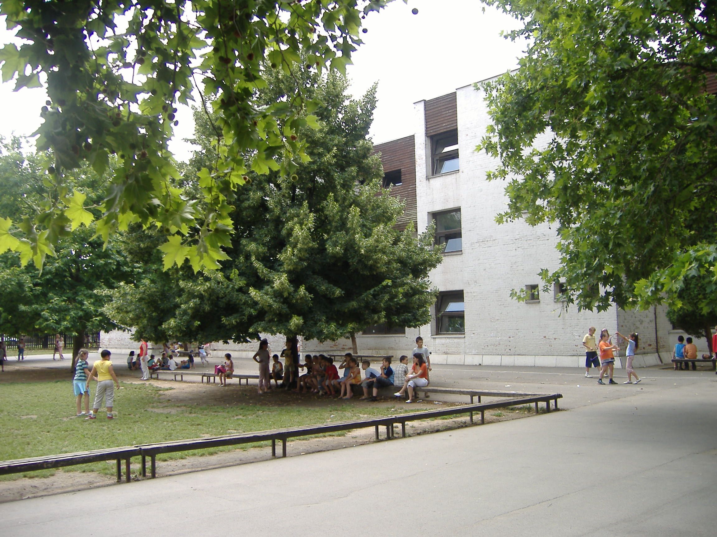 A makói Makói Általános Iskola, Alapfokú Művészetoktatási Intézmény és Logopédiai Intézet új épülete a Kálvin téren